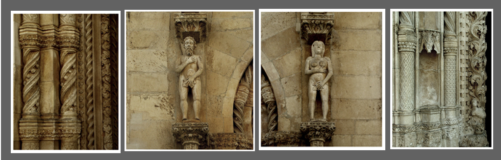 Szent Jakab-katedrális szobrai, Šibenik, Horvátország